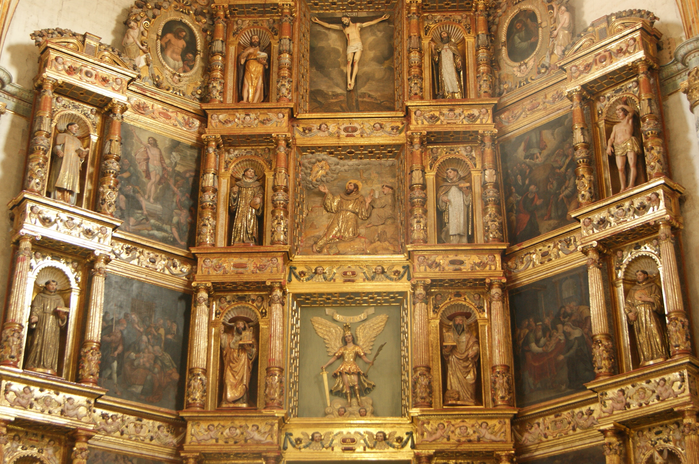 Convento de San Miguel Arcángel en Huejotzingo, Puebla